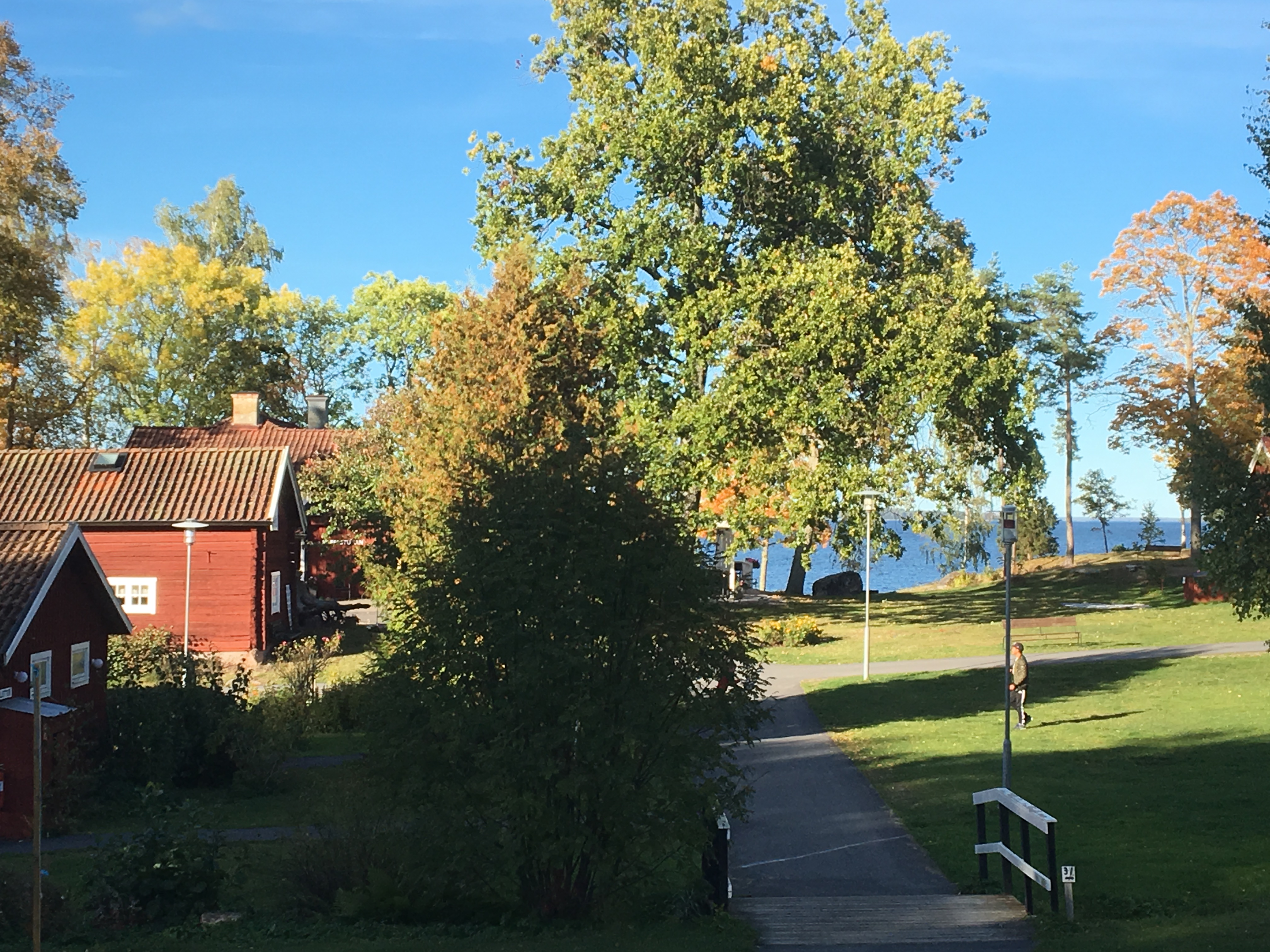 Vy från Hjälmargårdens läger- och konferensgård i Vingåkers kommun 2016.